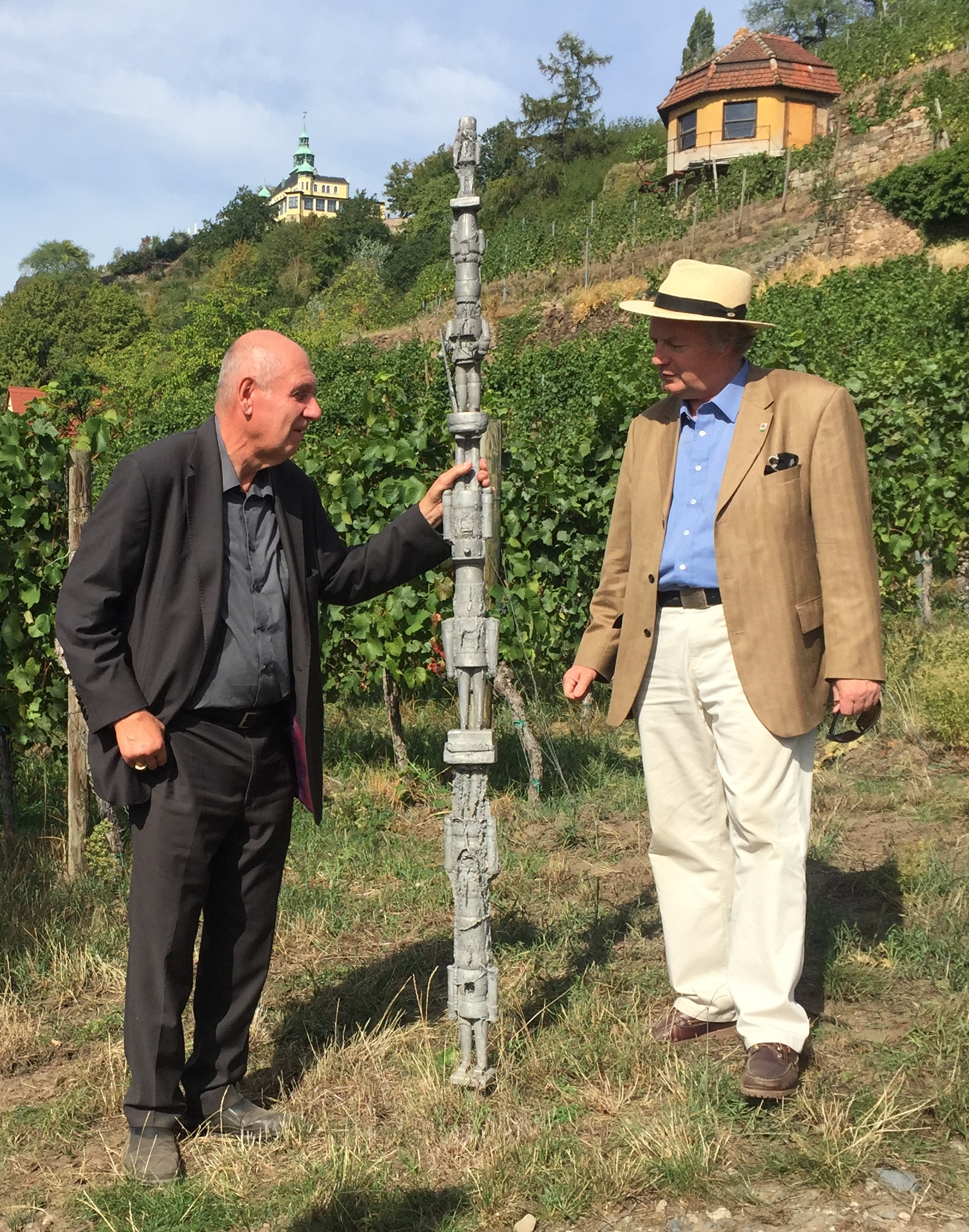 Stehle aus Nussknackern, Aluminum, auf dem Weinberg des Weinguts "DREI HERREN". Das Bild zeigt Professor Rainer Beck, deutscher Kunsthistoriker und emeritierter Professor an der Hochschule für Bildende Künste Dresden am Hang seines Weinguts in Sachsen und Osmar Osten.